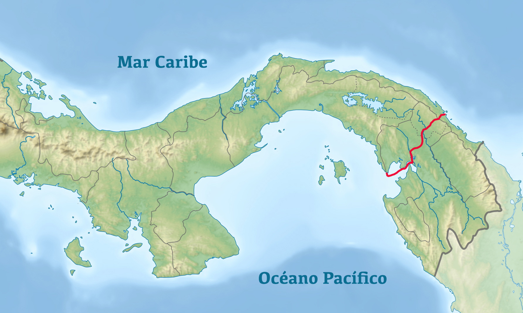 Ruta seguida por Balboa en su descubrimiento del Mar del Sur de 1513. Desde Acla (Sasardí-Mulatupo) hasta el Golfo de San Miguel.